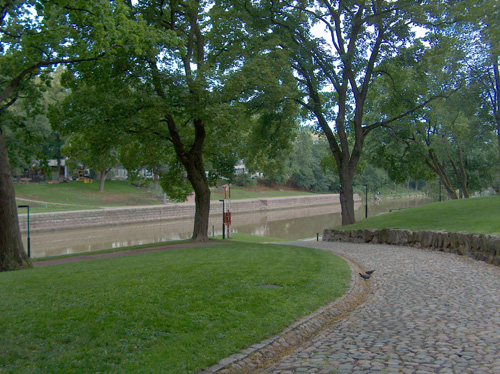 Tuomiokirkonpuisto Turussa.